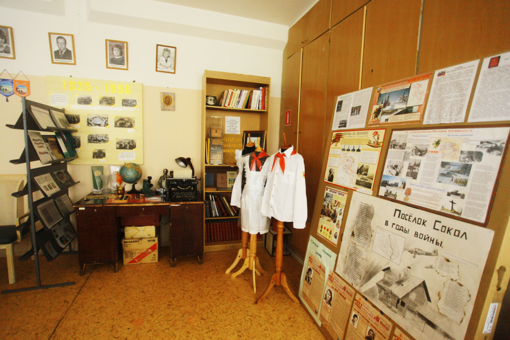 Школьный музей